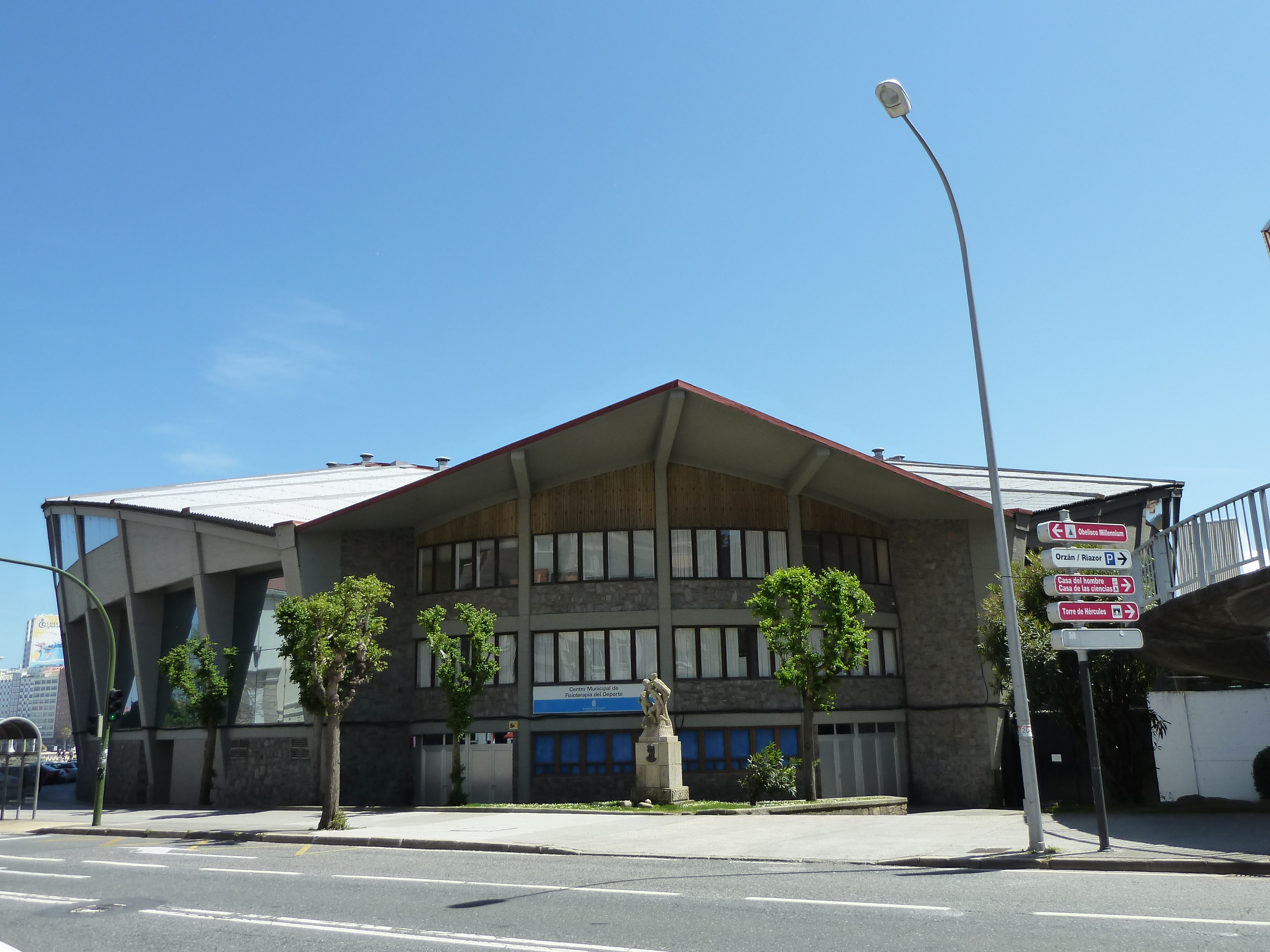 Pazo dos Deportes de Riazor na cidade da Coruña.